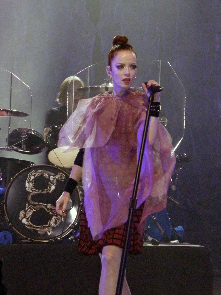 во дворце спорта